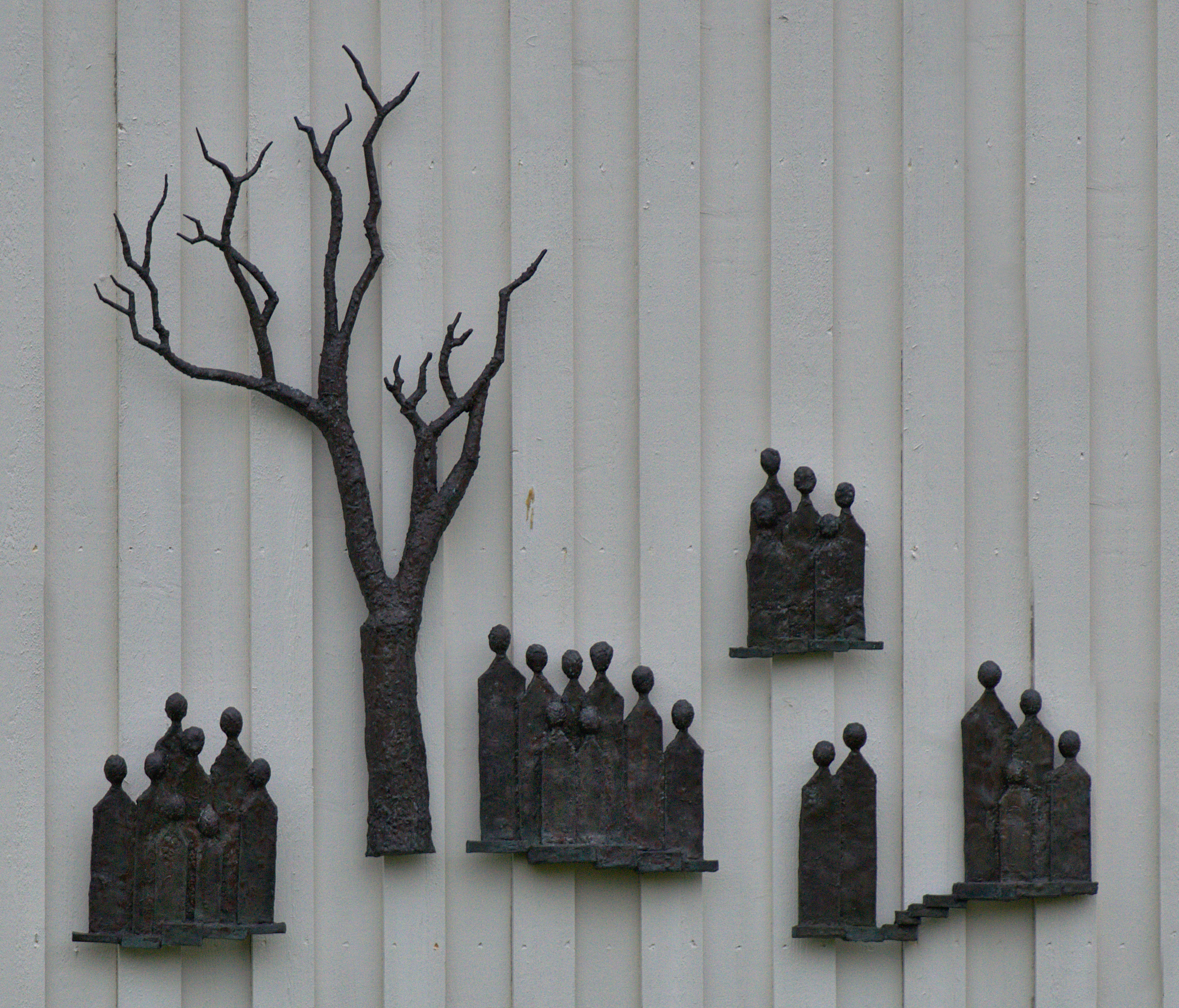 Vid kunskapens träd - Lars-Erik Wall, 1995, Riagården i Åkers Styckebryk i Strängnäs kommun.